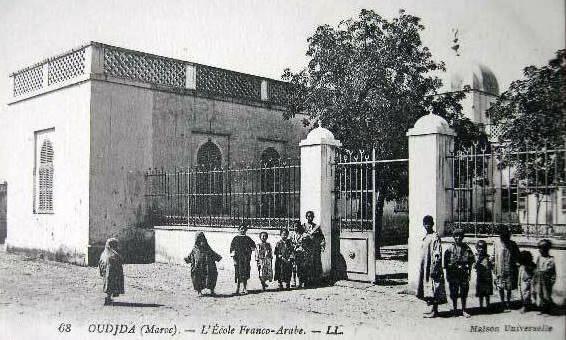 Cette photographie insérée dans un bouquin est la reproduction d'une carte postale éditée par la "Maison Universelle"...il s'agit de la nouvelle école franco-arabe d'Oudjda construite en 1910...